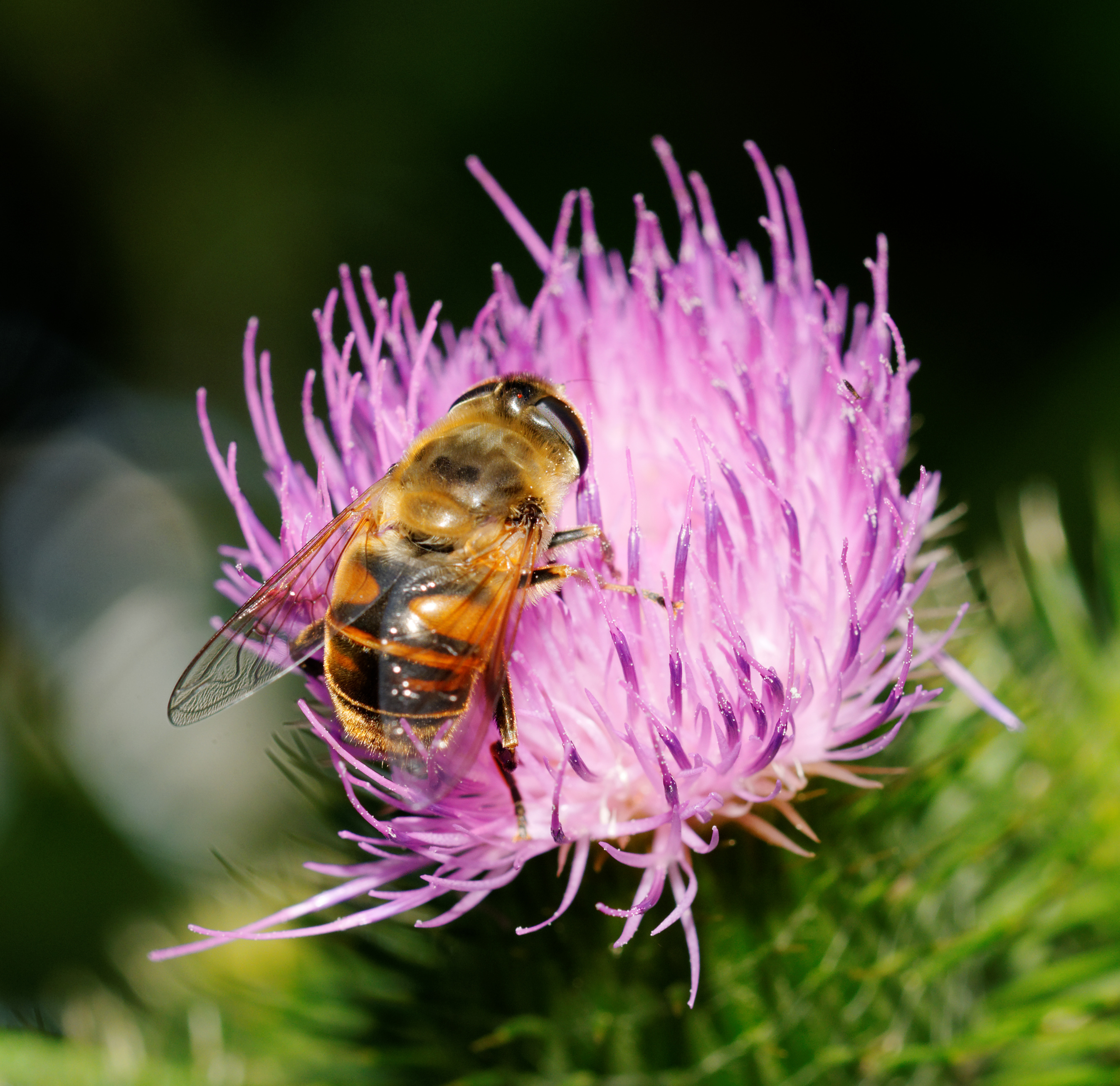 Syrphe (Syrphidae sp.) sur une fleur.